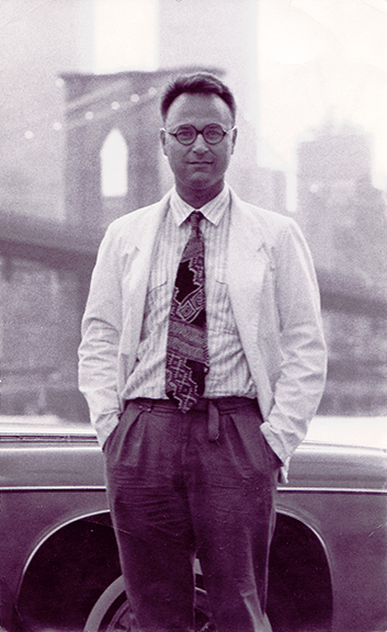 Roger David Servais in New York, 1984, Foto: Marguerite Servais